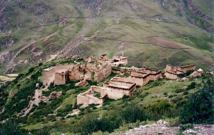 Monastery ruins, Yerpa 1993